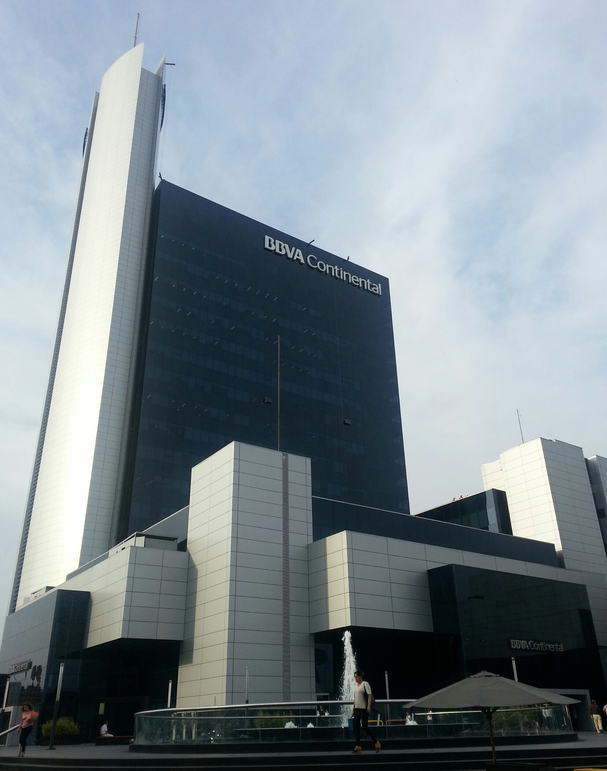 Edificio BBVA Continental en San Isidro, Lima Perú.